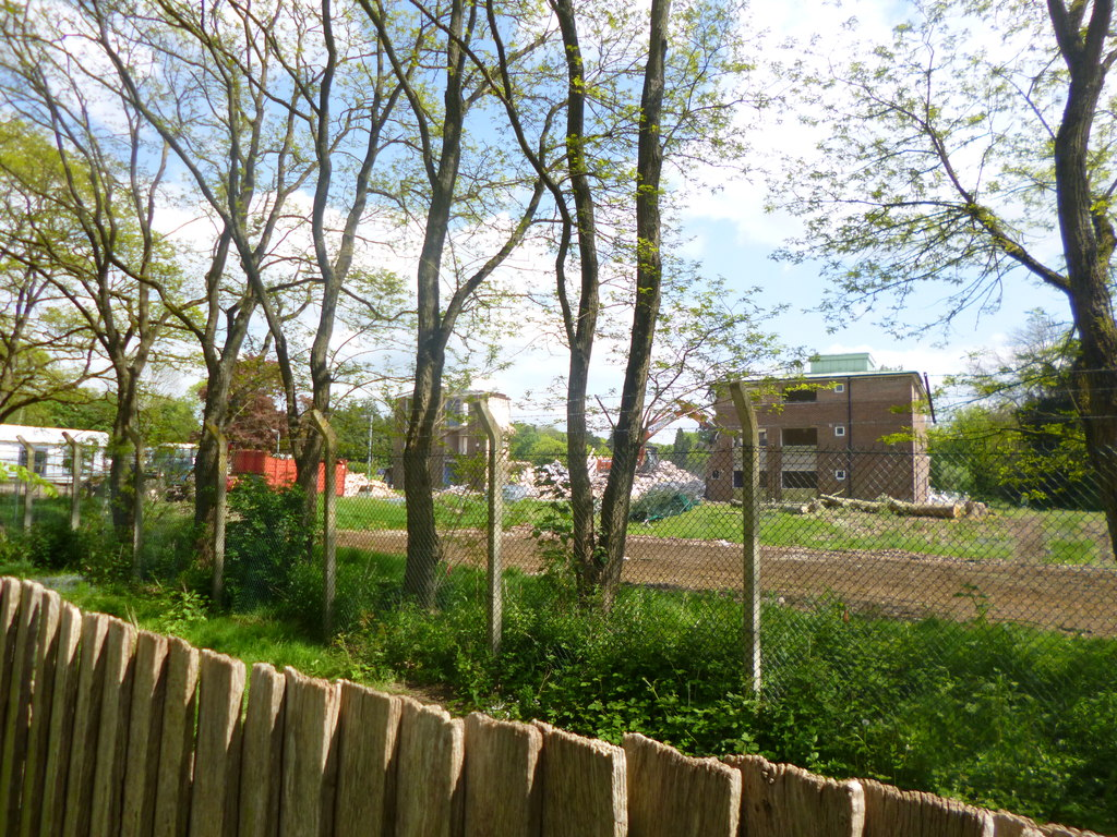 Erskine Barracks